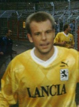 Porträt des ehemaligen Fußballspielers Frank Pingel